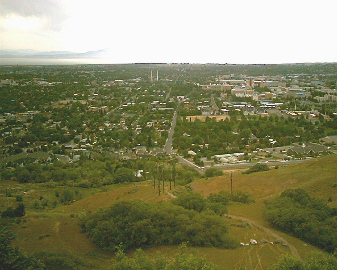 Vista del valle de provo desde el mirador.